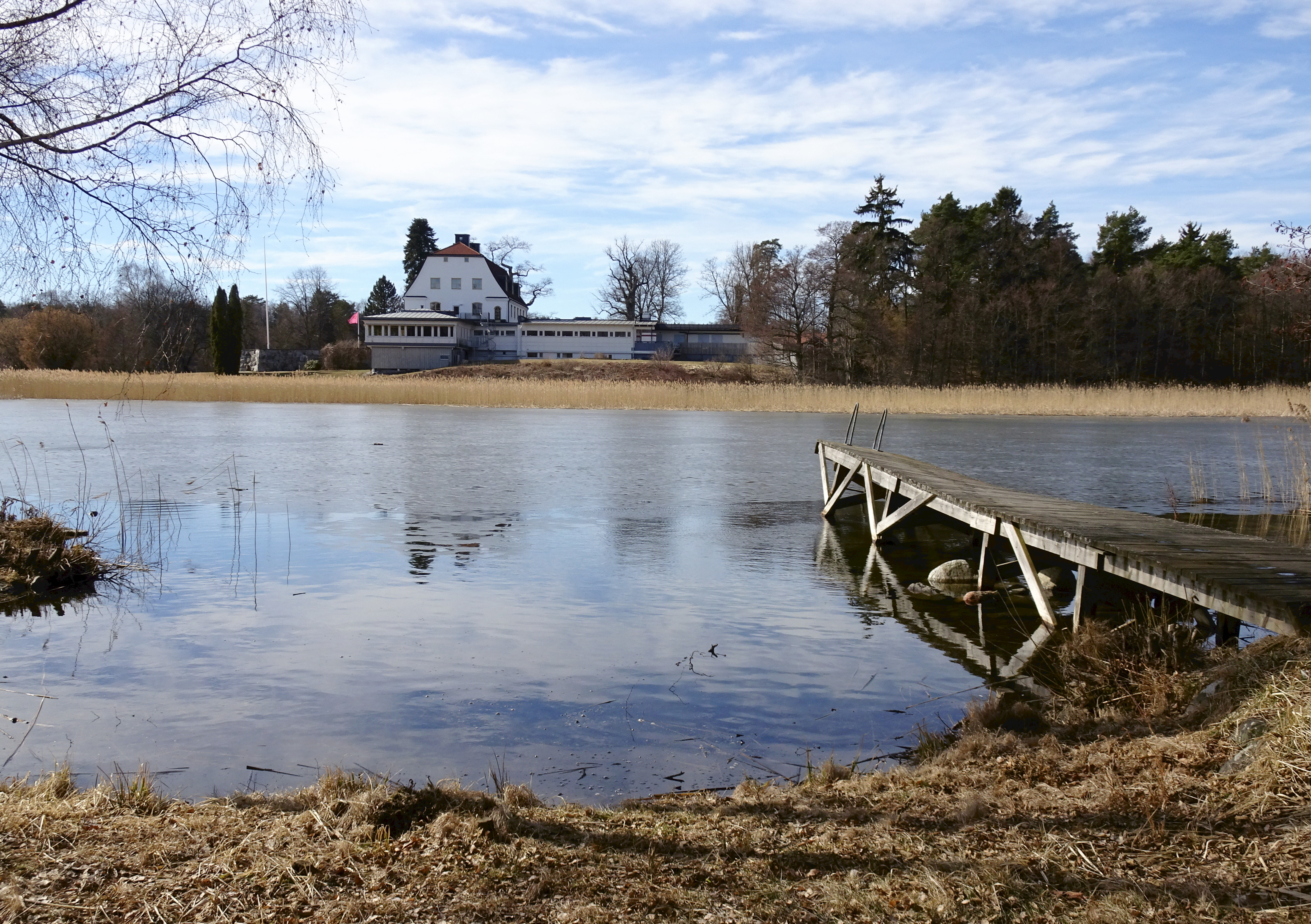 Kvistabergsviken med Tammsviks gård i bakgrunden